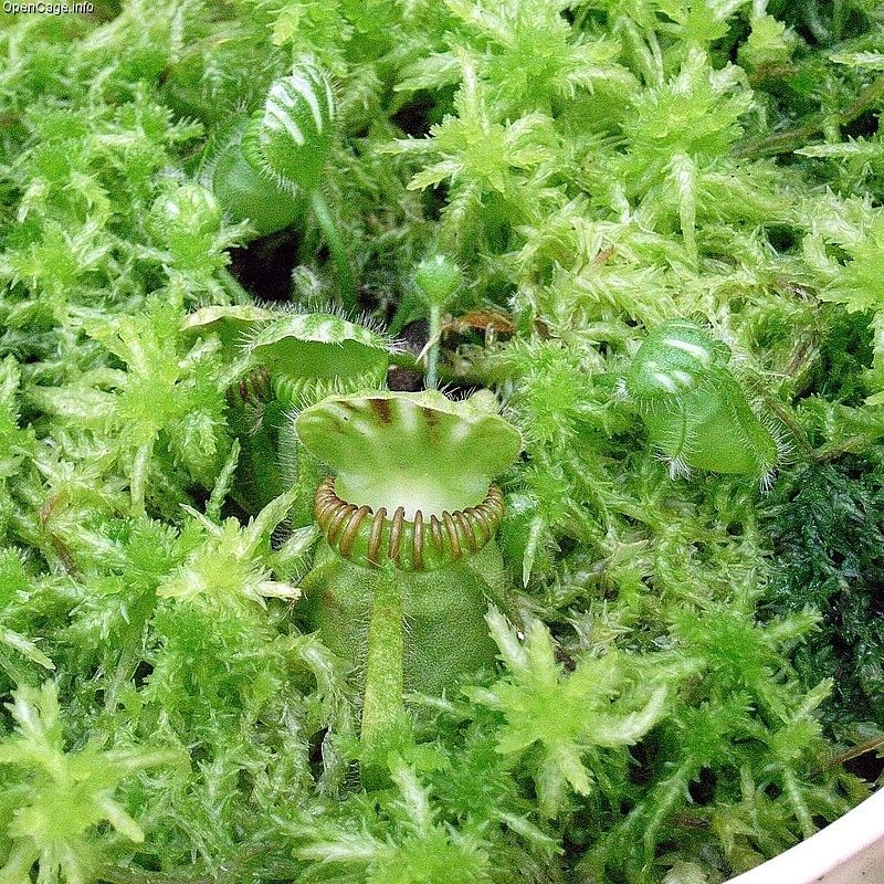 フクロユキノシタ（セファロタス） Albany pitcher plant (Cephalotus)